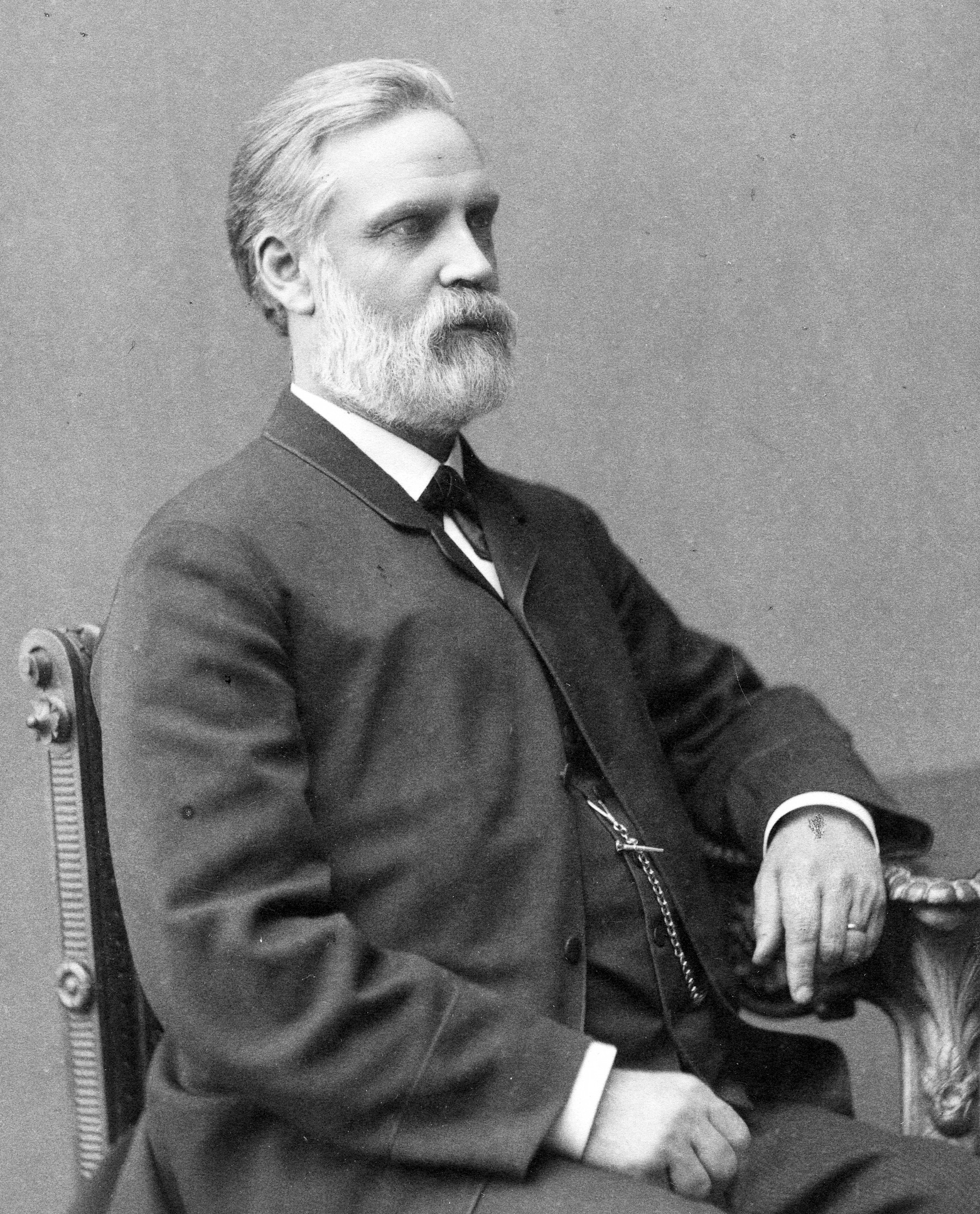 Brukspatron Johan August Bång. 1831 - 1912.